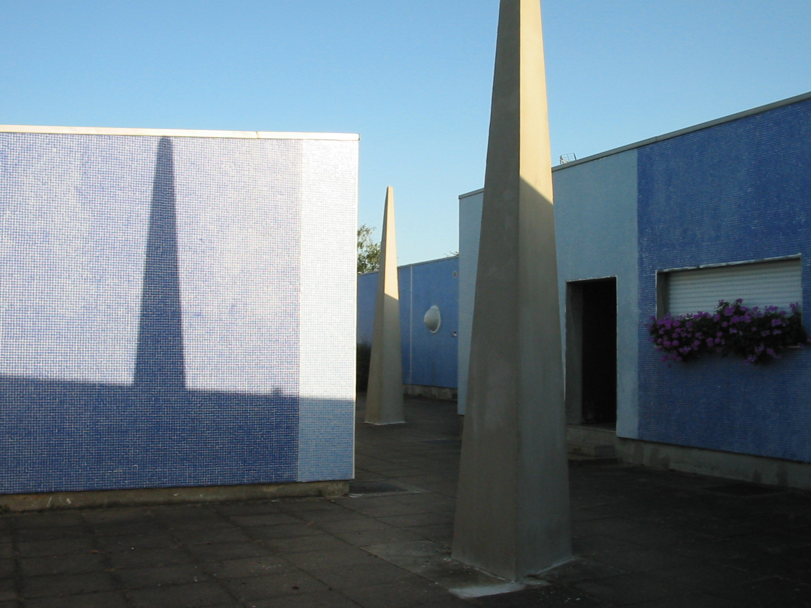 Ile-de-France / Essonne / Grigny / Quartier de la Grande Borne / Secteur des Patios, allée des Pyraamides